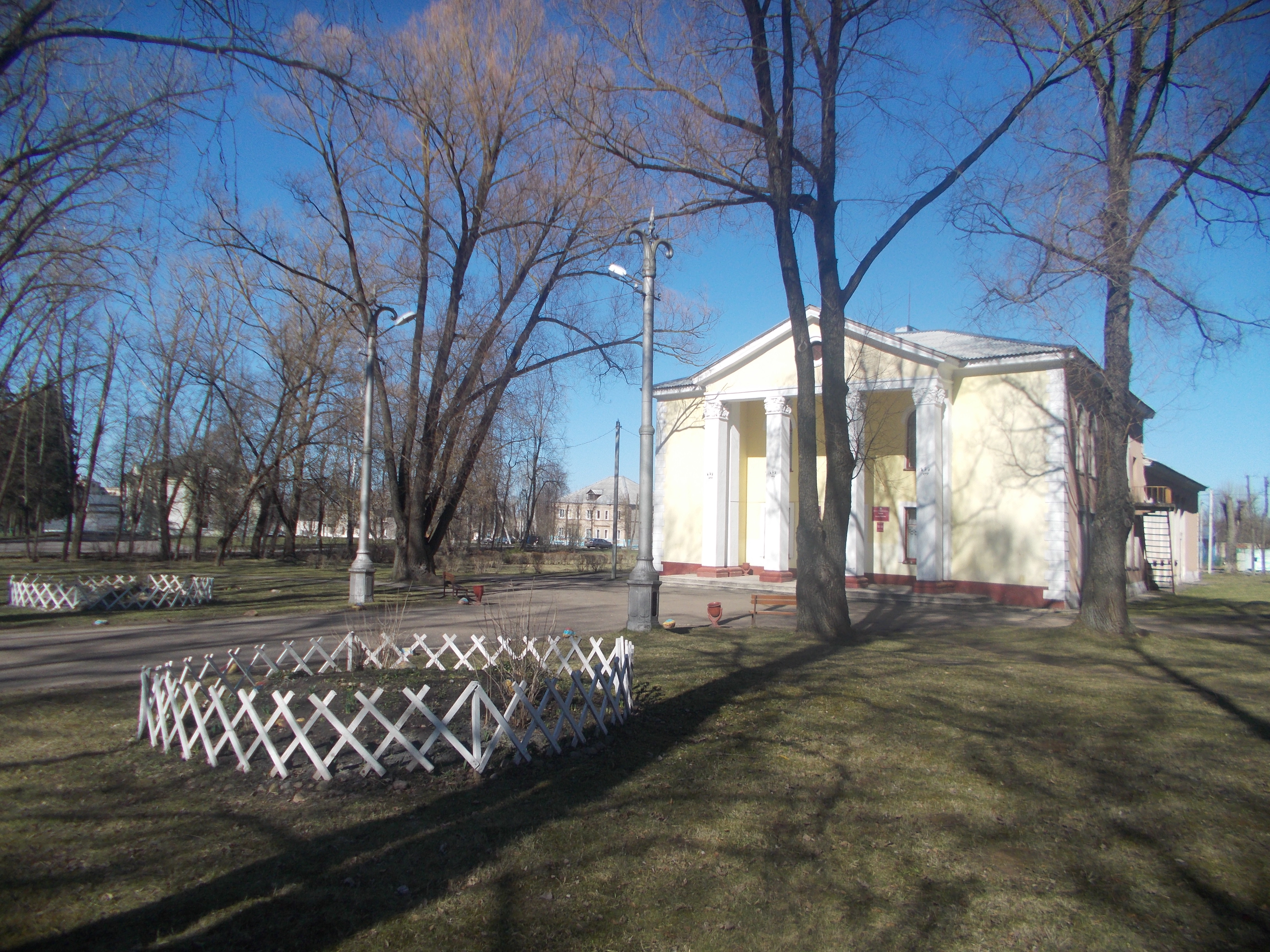 какакака